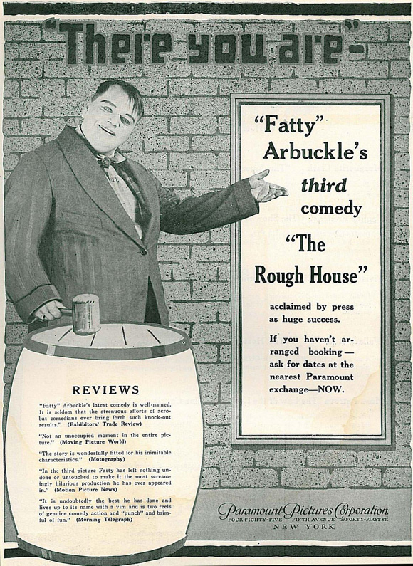 Постер до фільму Грубий будинок 1917 року.